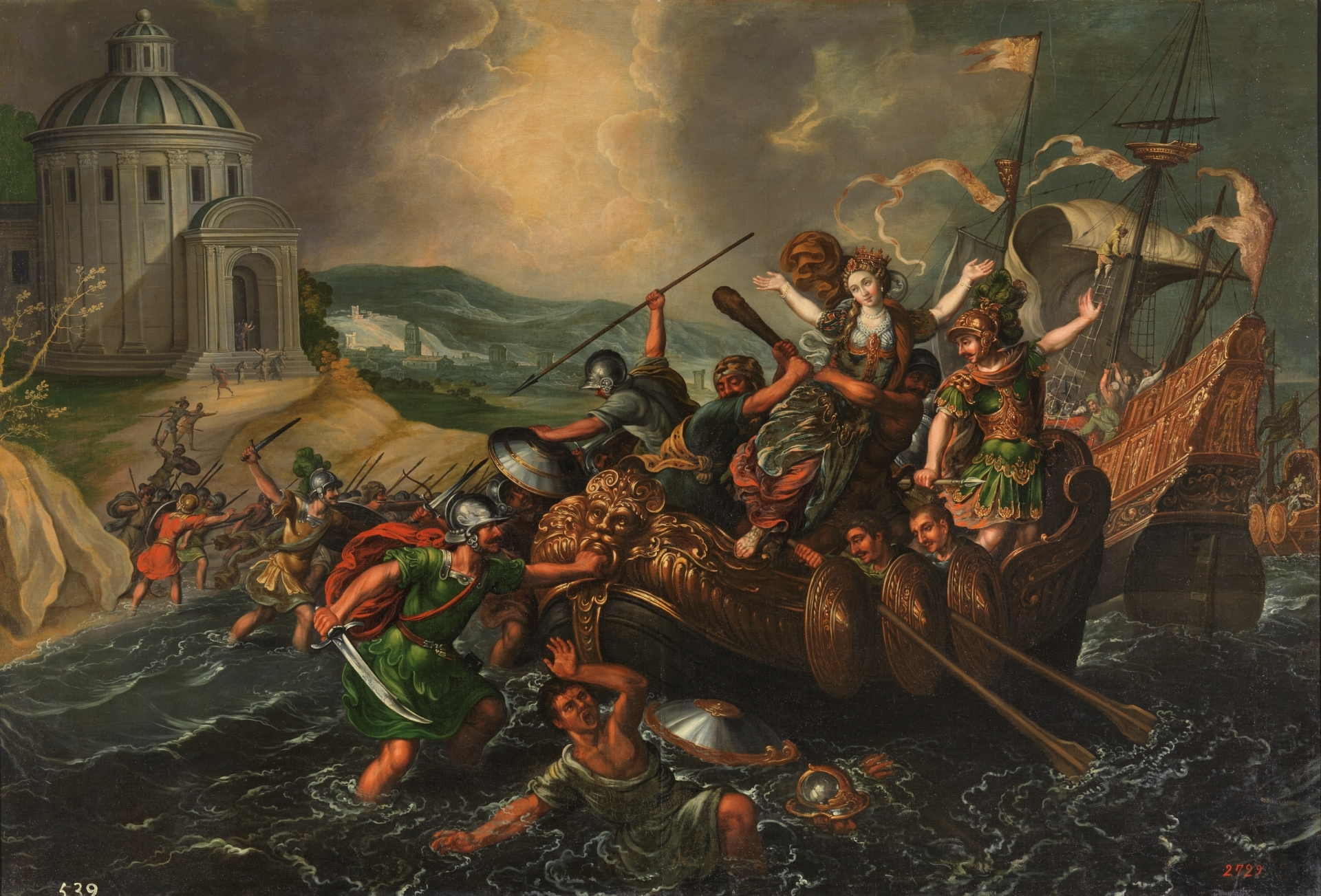 La obra representa el secuestro de Helena por el príncipe troyano Paris.